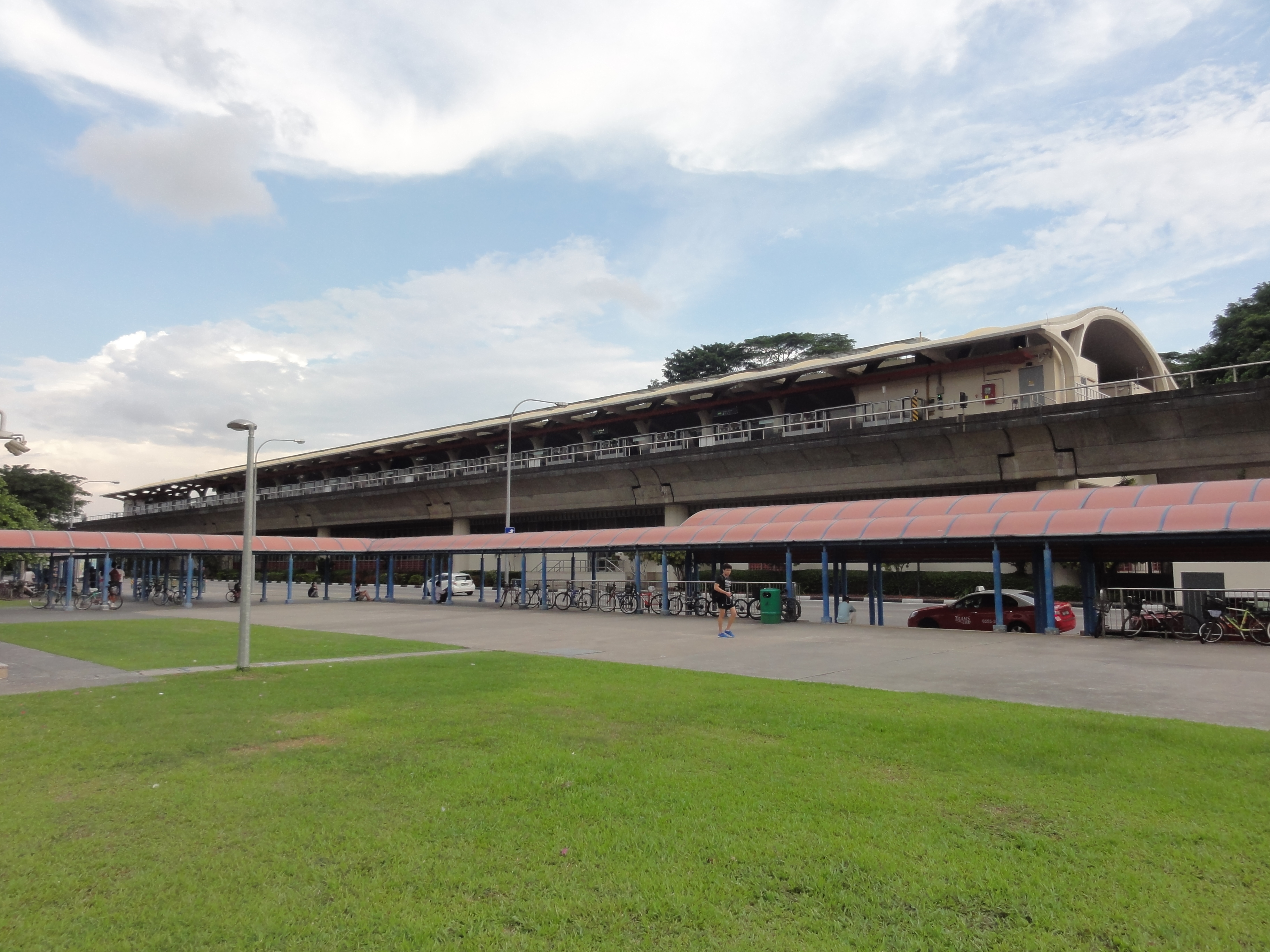 Tanah Merah MRT Station